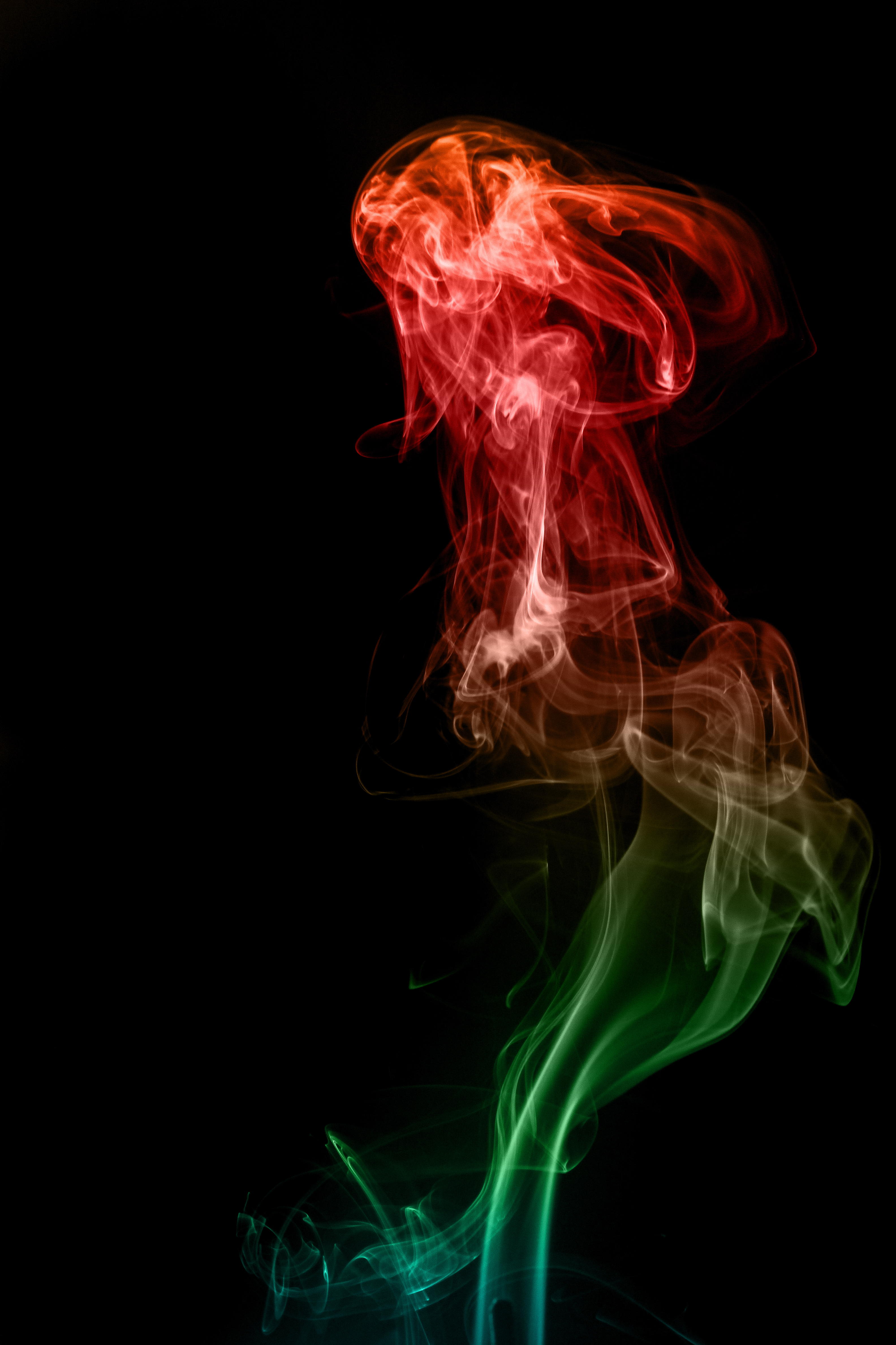 צילום עשן בסטודיו, עם תוספת עריכה בפוטושופ ליצירת צבעוניות מגוונת